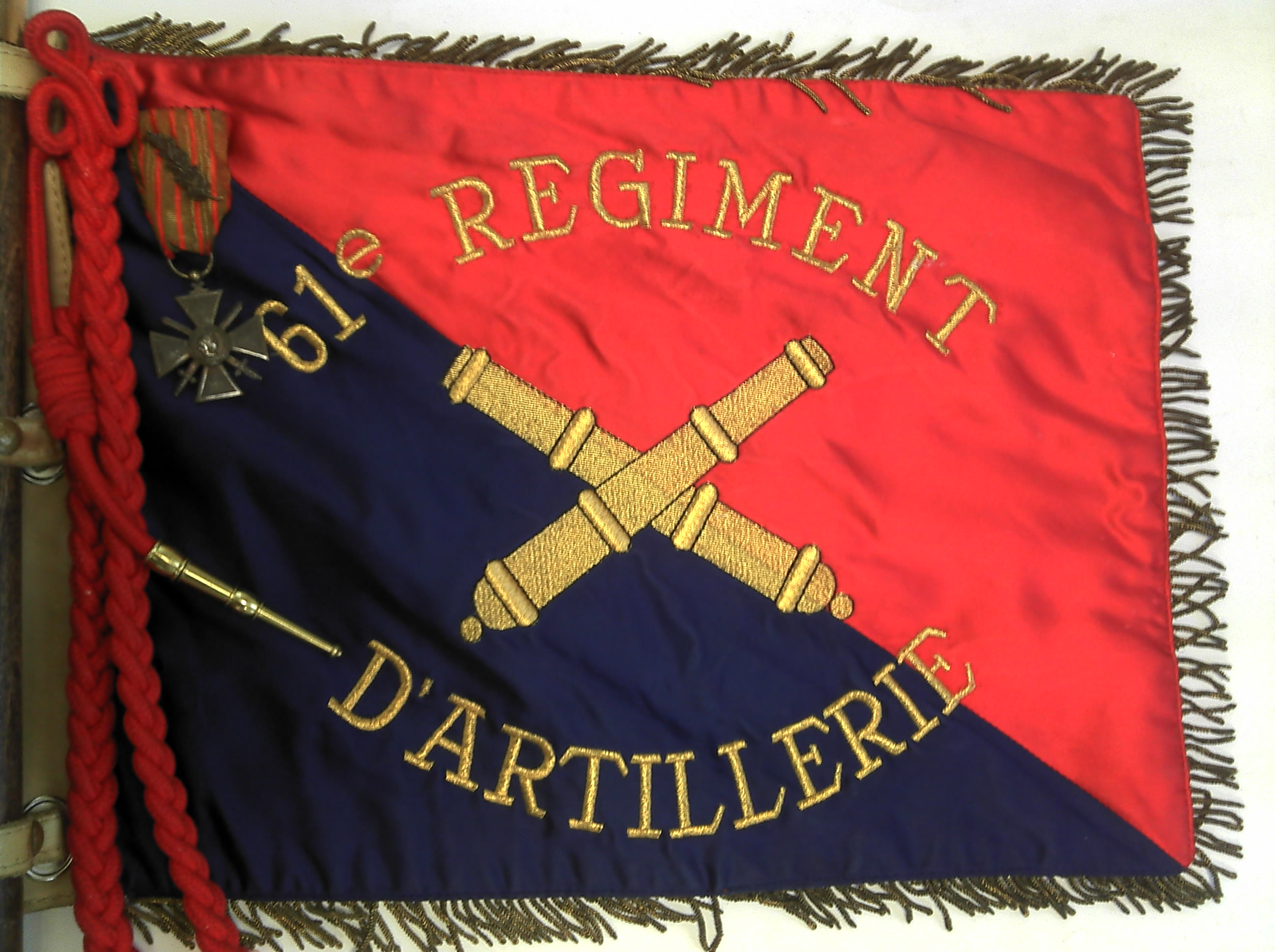 Revers du fanion de la 2e batterie